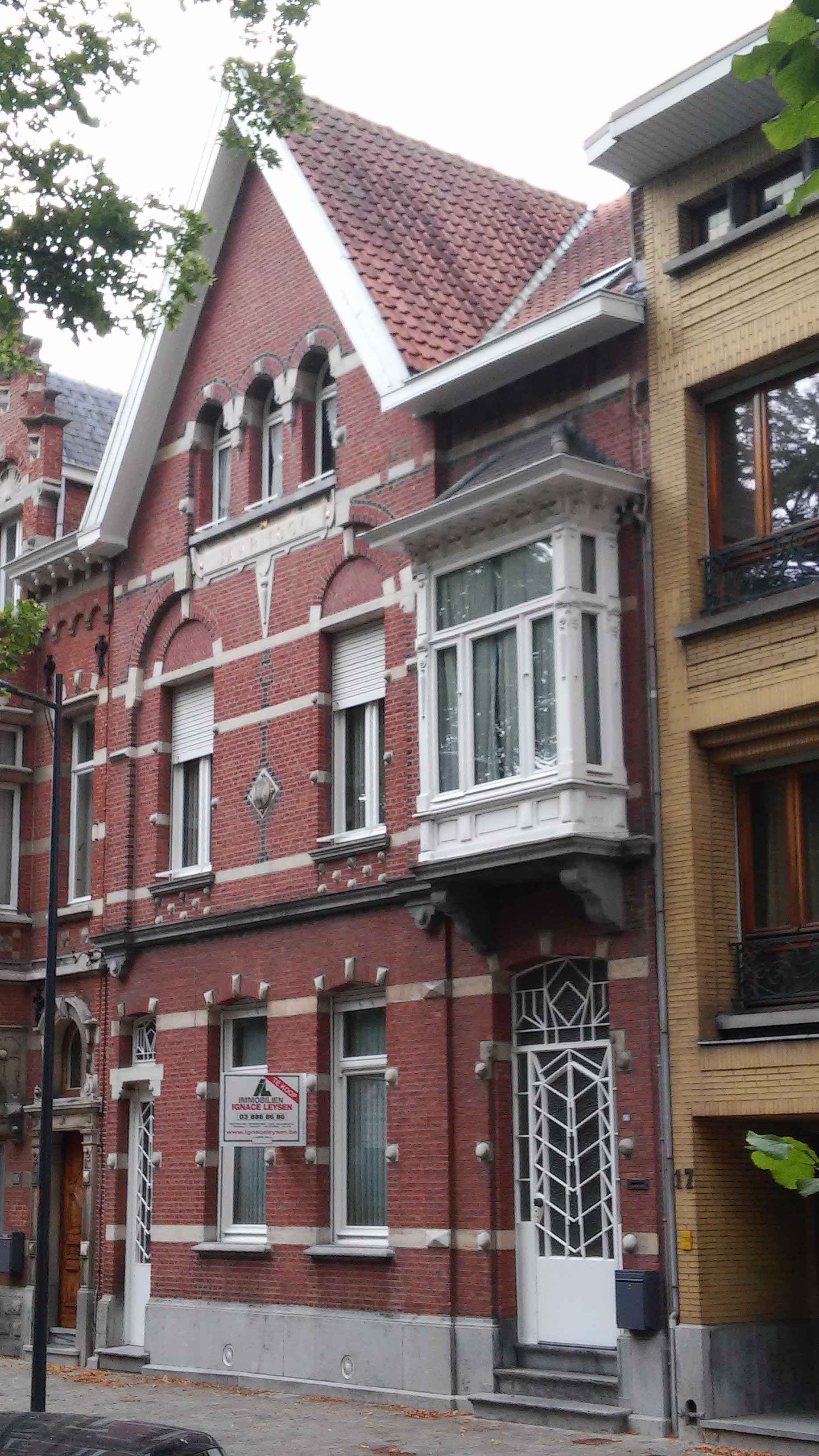 Burgerhuis neo-Vlaamse renaissance 1900